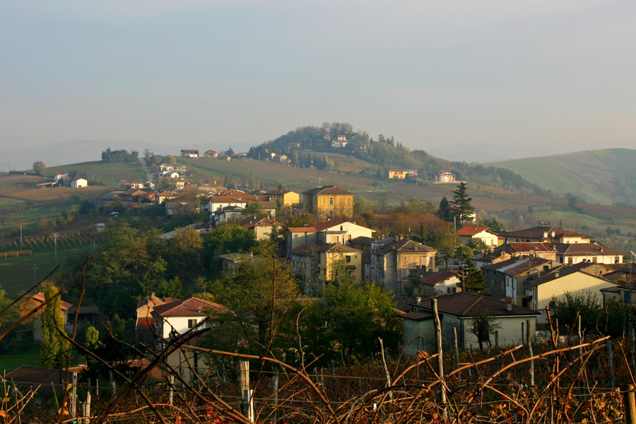 Veduta di Montalto Pavese